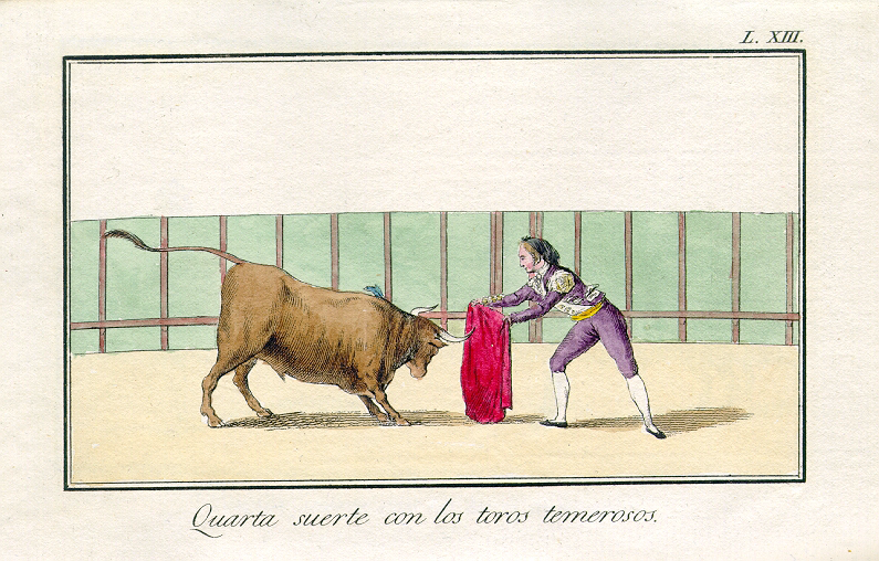 Delgado y Gálvez, José: Tauromaquia o arte de torear á caballo y á pie